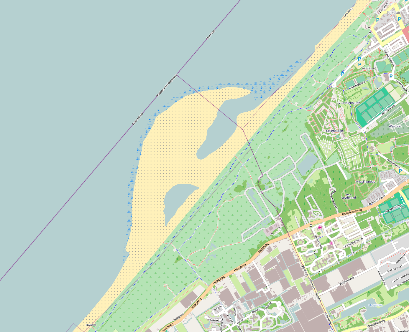 Openstreetmap van de Zandmotor